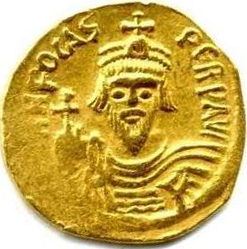 Solid Fokasa. Awers. autor: mzopw licencja: GNU FDL